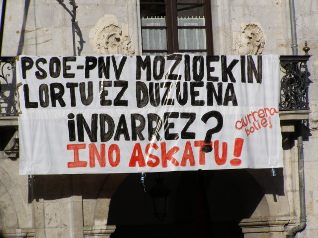 Ino Galparsoro, Arrsateko alkatea, aska dezaten eskatzen duen pankarta, Arrasateko udaletxean.